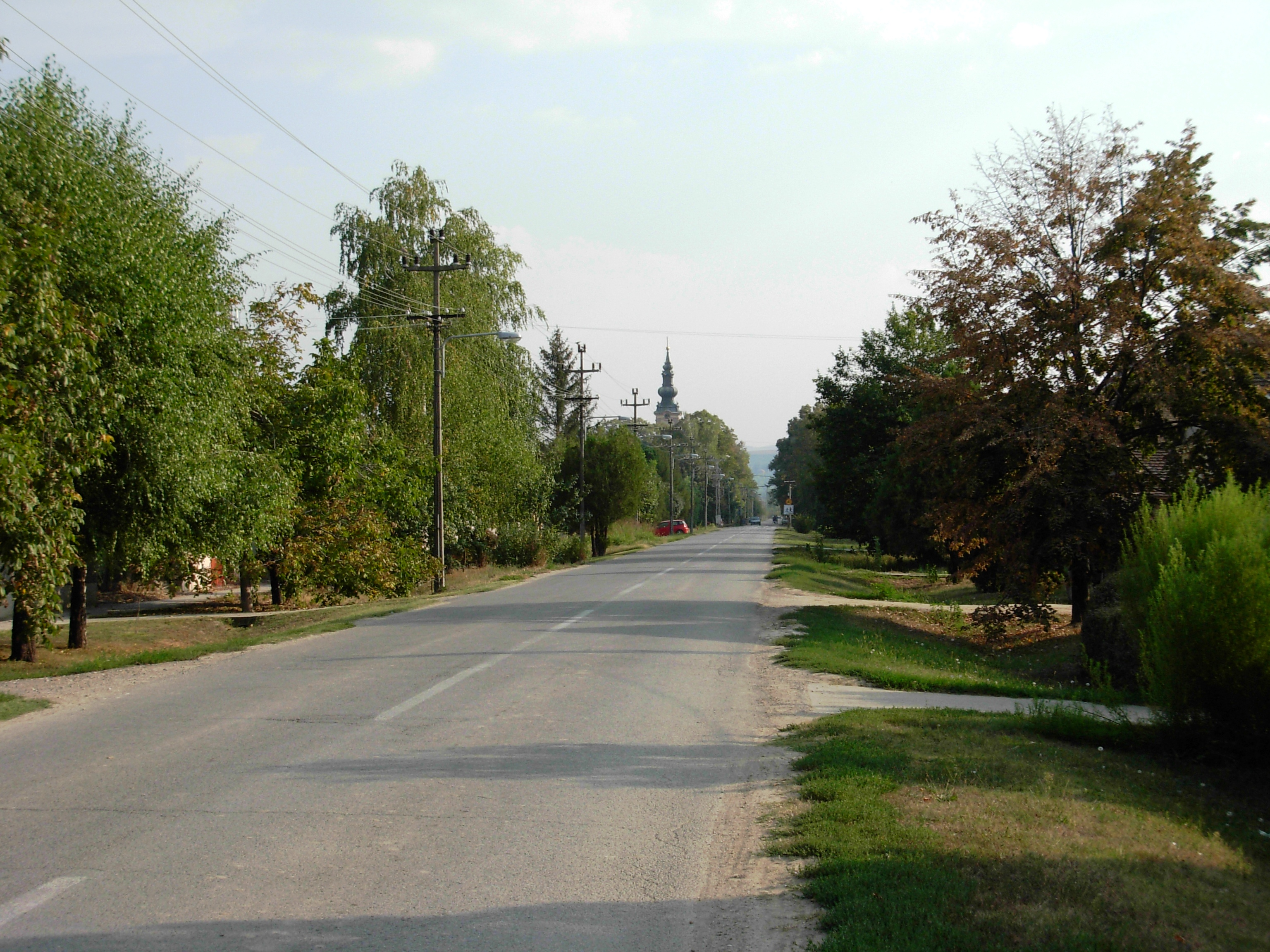 Ulica u Begeču.